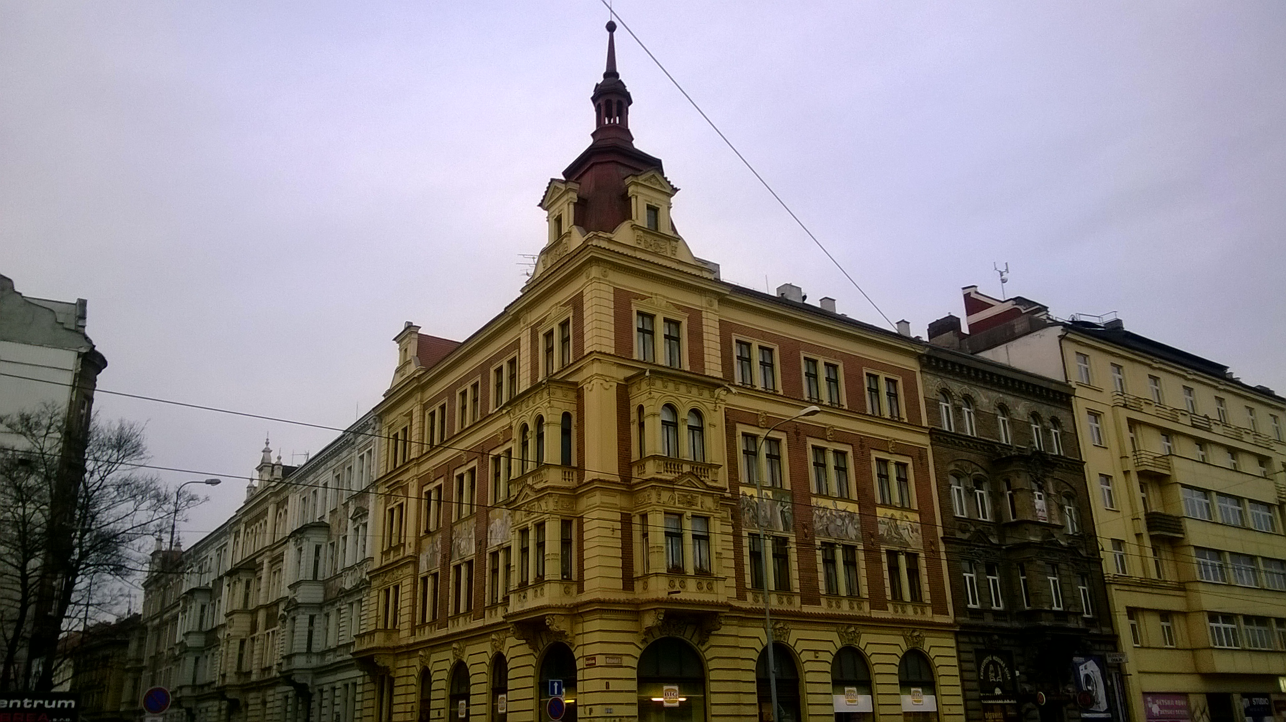 Roh domu se sgrafity od Mikoláše Alše